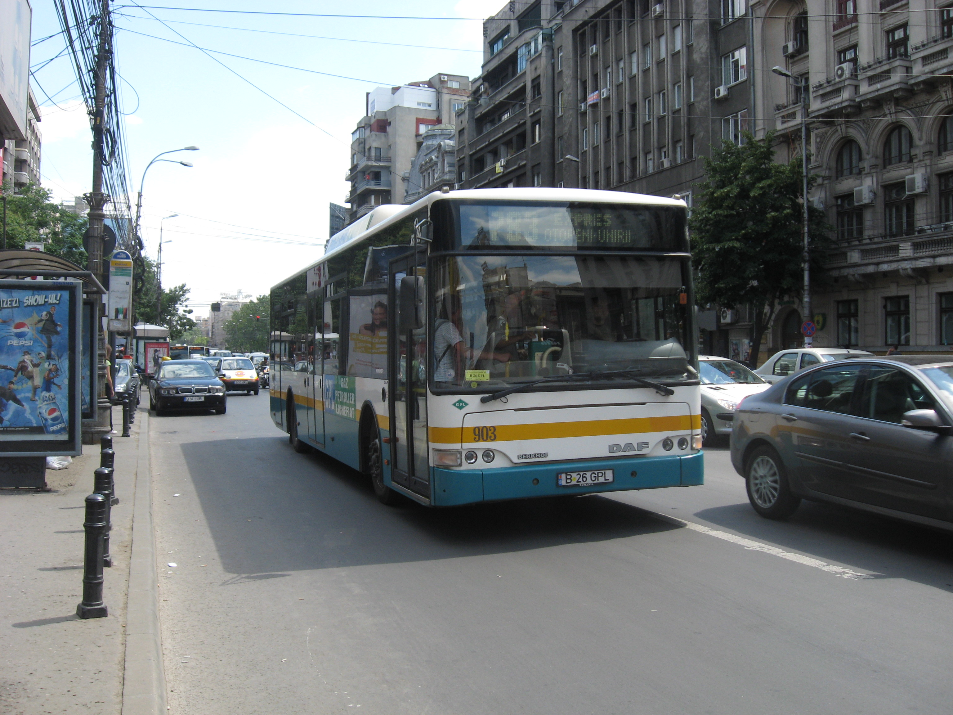 Autobuz RATB DAF Berkhof #903